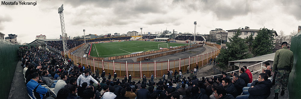 سراسرنما استادیوم عضدی رشت در یک بازی خانگی داماش گیلان